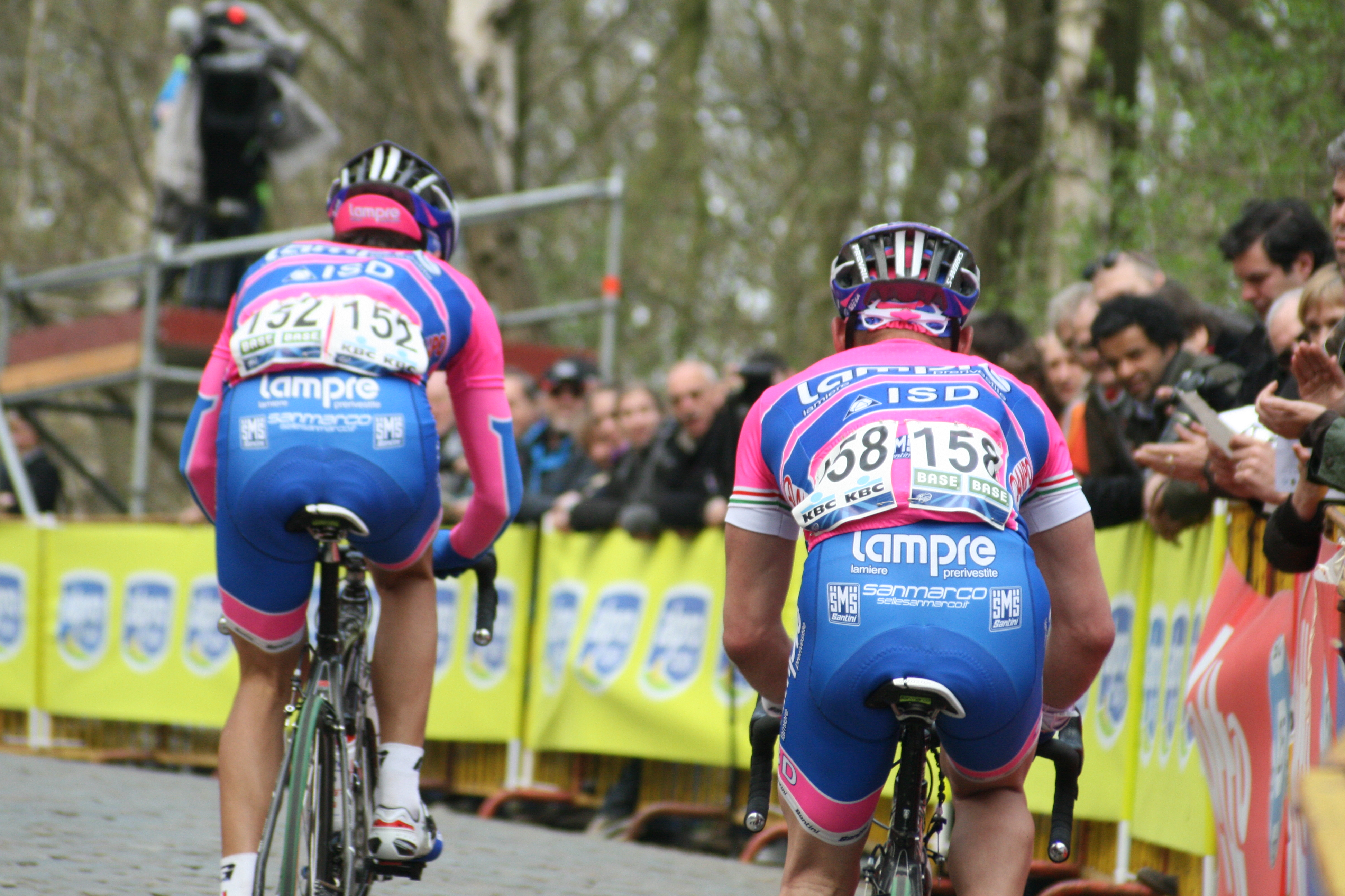 Gent-Wevelgem 2011, Kemmelberg